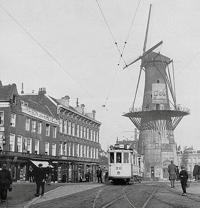 Molen 'De Noord' op het Oostplein te Rotterdam. Verbrand en afgebroken in 1954